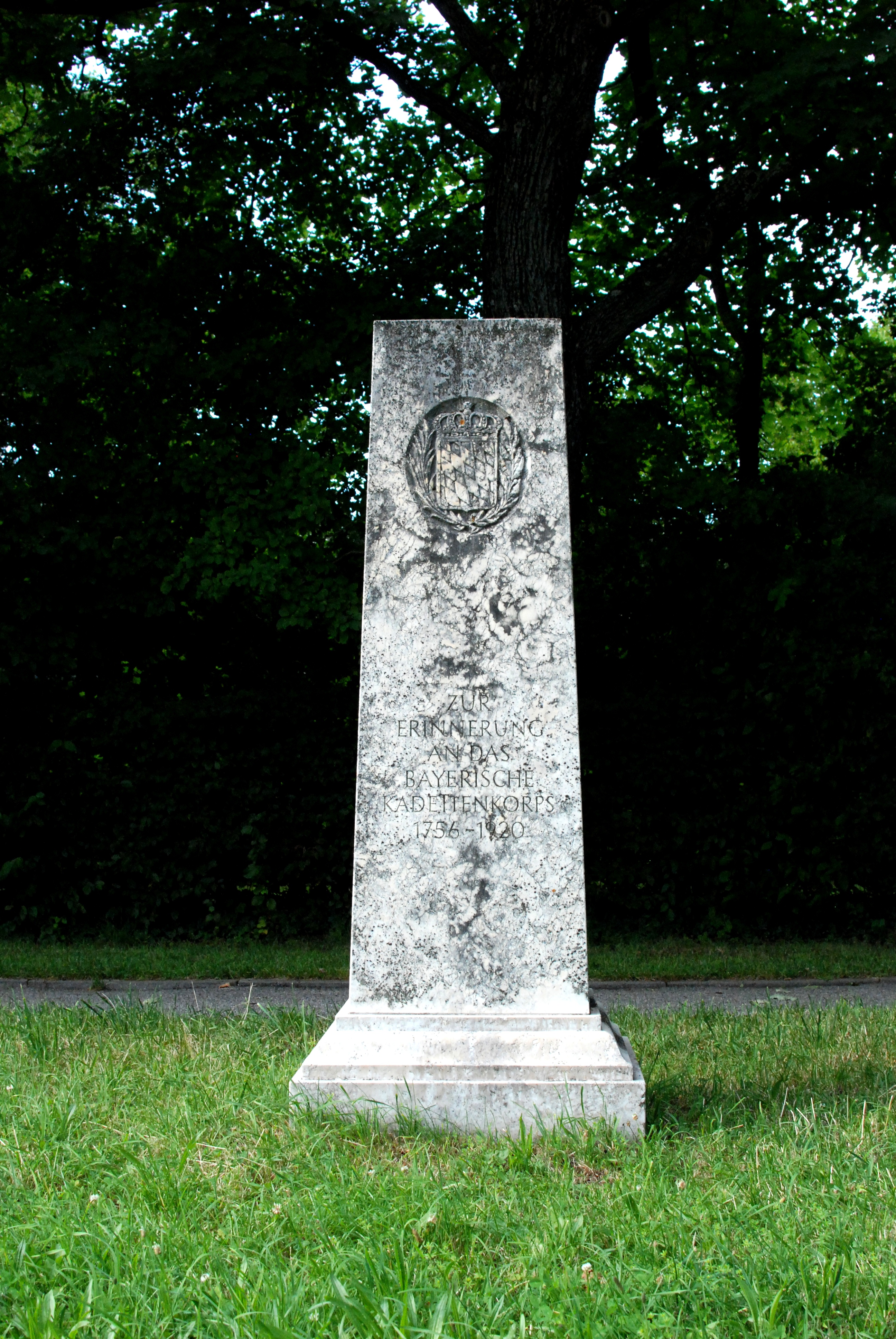 Gedenkstein für das Bayerische Kadettenkorps am Marsplatz in Neuhausen, Stadtteil von München, Regierungsbezirk Oberbayern, Bayern.